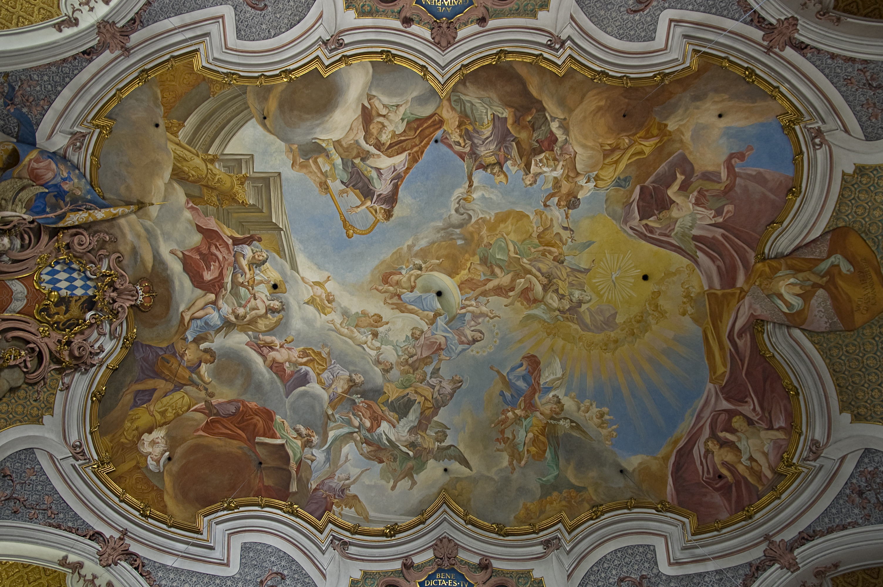 Klosterkirche St. Anna im Lehel - Deckenfresko. Die römisch-katholische Klosterkirche St. Anna im Lehel ist die erste Rokoko-Kirche Altbayerns und prägend für die Entwicklung der Sakralarchitektur in Bayern. Sie befindet sich im Zentrum des Lehel gegenüber der katholischen Pfarrkirche St. Anna im Lehel. Hochaltar- und Deckenfresken von Cosmas Damian Asam.This is a photograph of an architectural monument.